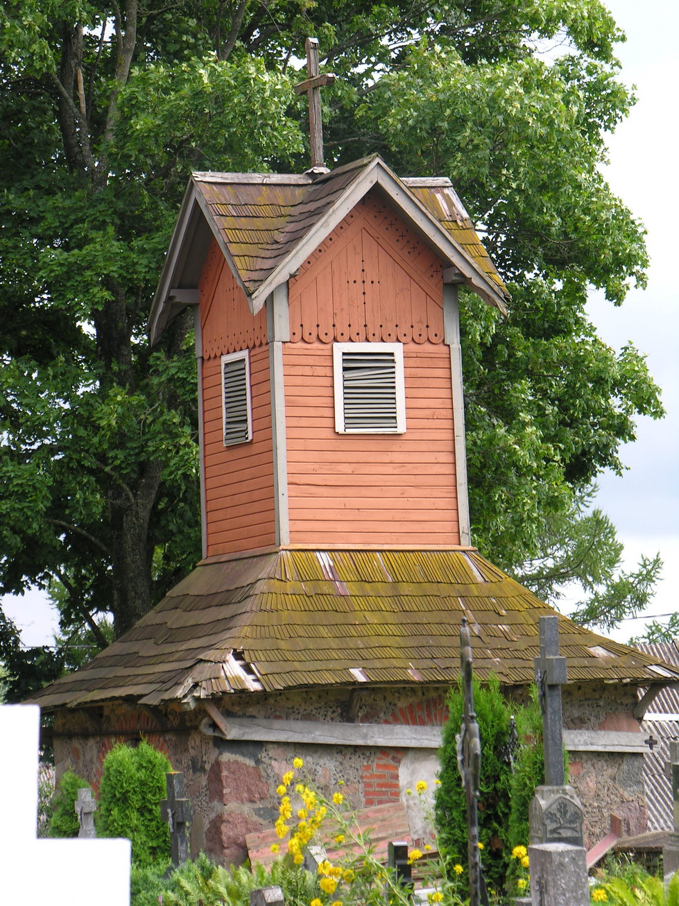 Ukrinų Šv. Antano Paduviečio bažnyčia, varpinė Mažeikių raj., Ukrinai Fotografavo: Algirdas, 2005 m. rugpjūčio 13 d., Lietuva